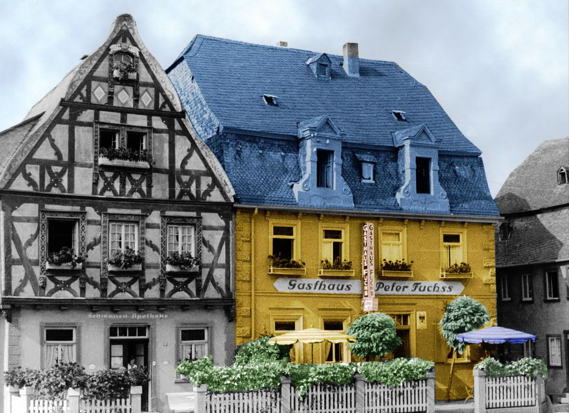 Apotheke und Gasthaus Jägerhof in Kirchberg/Hunsrück